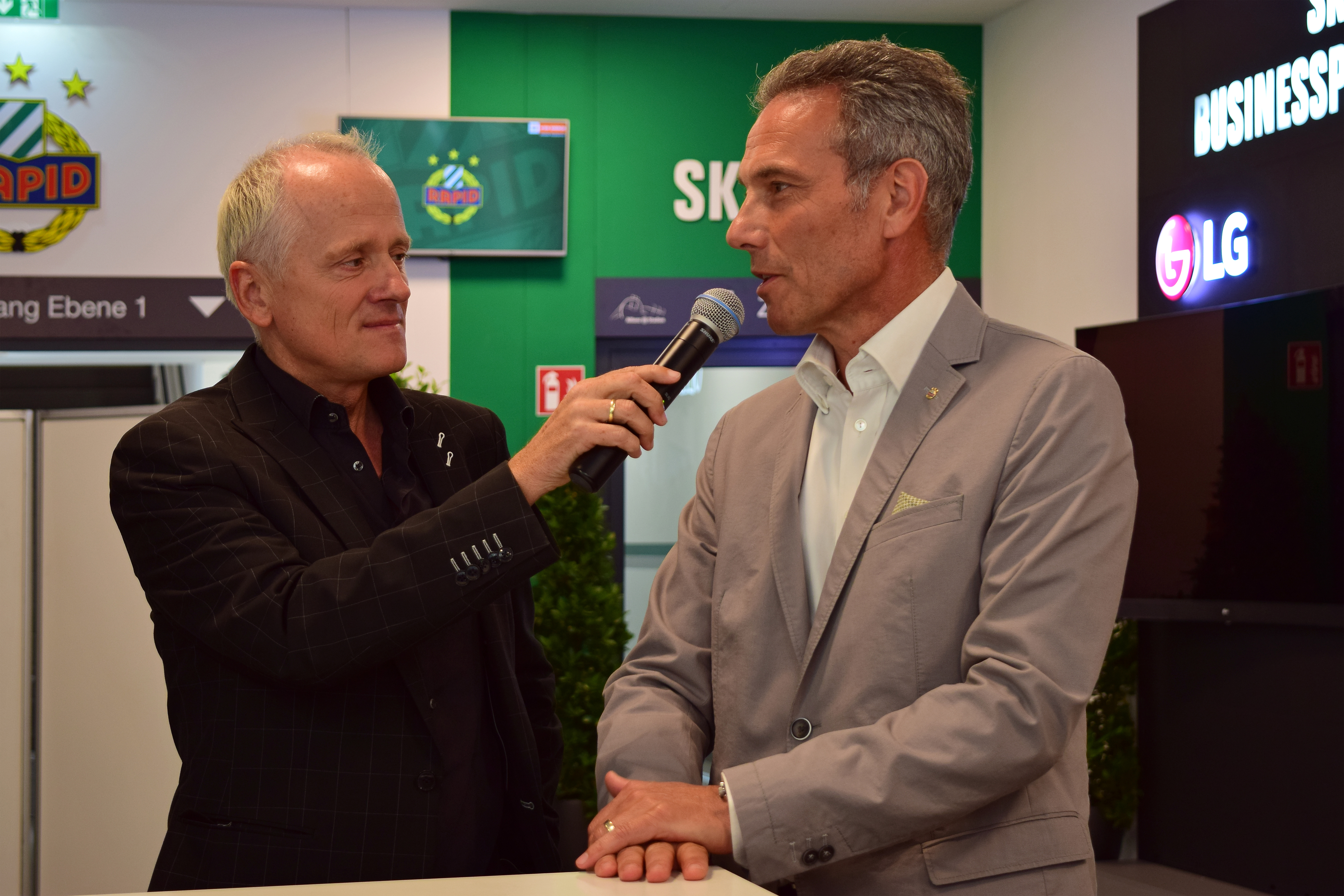 Andreas Marek und Michael Krammer bei der Feier zur Benennung des Gerhard-Hanappi-Platzes und Eröffnung des neuen Rapideums im Allianzstadion